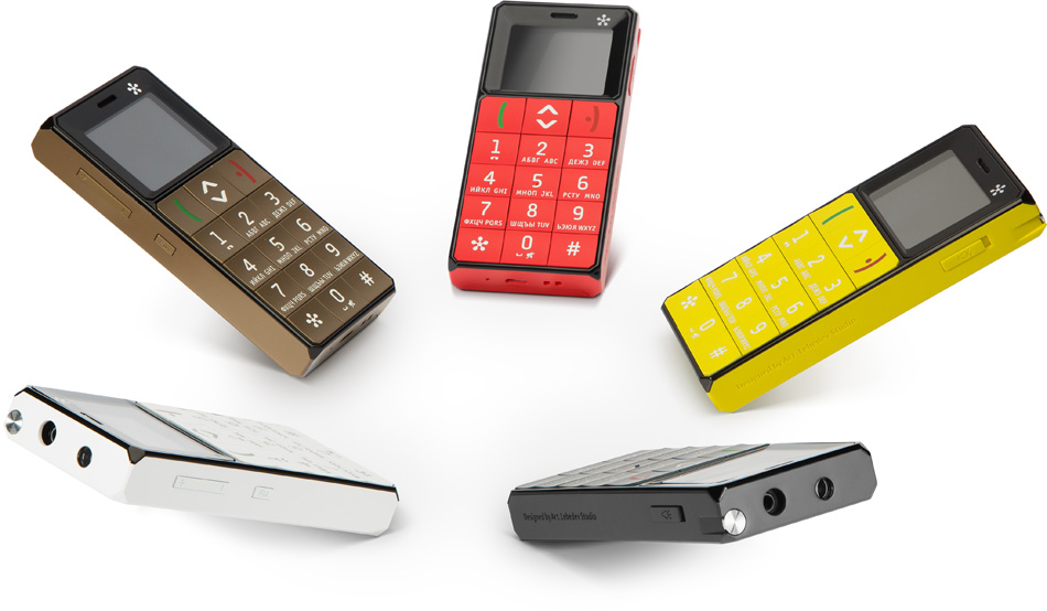 Mobilais tālrunis Just5 Brick